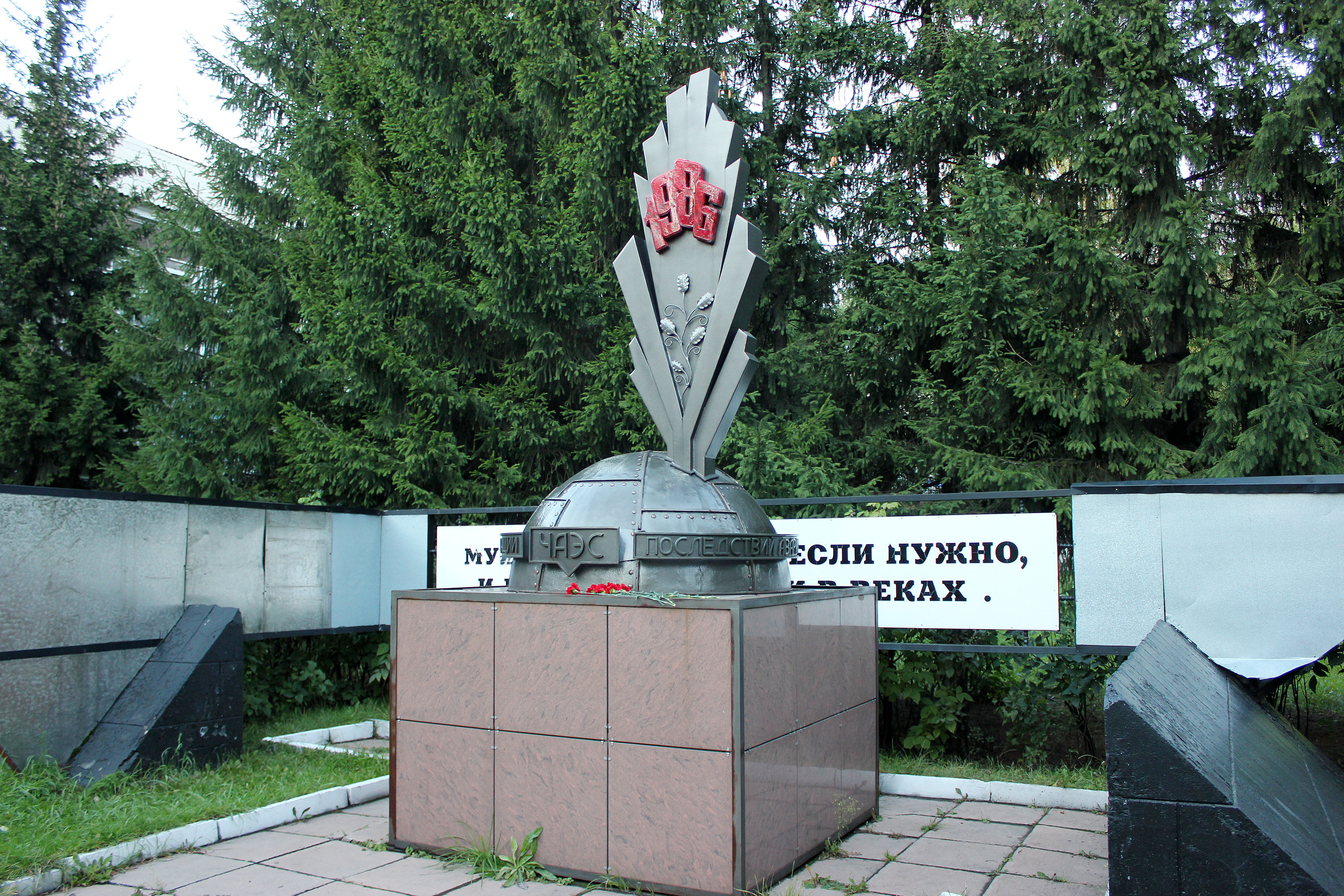 Мемориал жертвам аварии на Чернобыльской АЭС